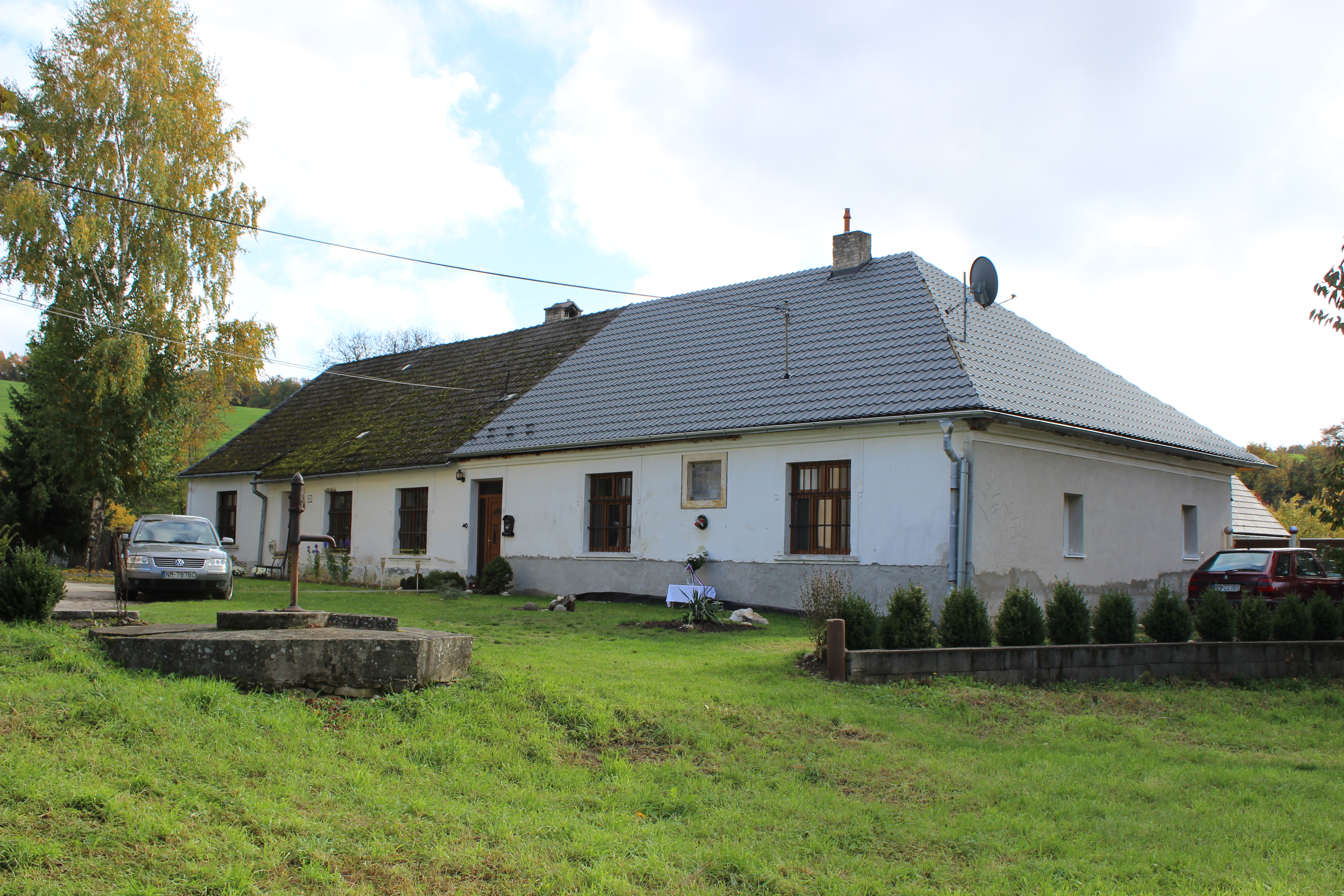 Rodný dům Ľudovíta Vladimíra Riznera.